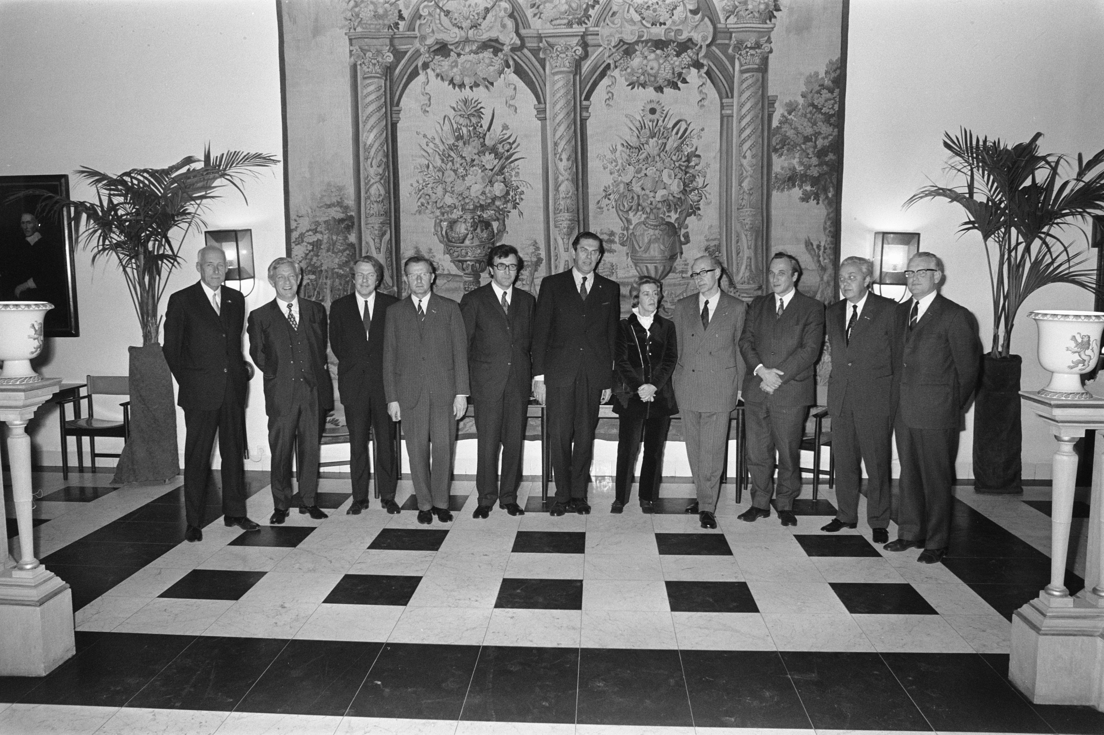 Collectie / Archief : Fotocollectie Anefo Reportage / Serie : [ onbekend ] Beschrijving : Premier Biesheuvel installeert voorlopige wetenschappelijke Raad voor het Regeringsbeleid, 1972. De Raad bestond in aanvang uit zes leden, te weten: de voorzitter, Dr. J. Kremers (psycholoog), Dr. Ir. W. J. Beek (fysisch technoloog), Prof. Dr. C. J. F. (Frits) Bottcher (chemicus), Prof. Dr. J. S. Cramer (economist), Ir. W. F. Schut (ingenieur in de weg- en waterbouwkunde), mevrouw Dr. H. M. in 't Veld-Langeveld (socioloog). Secretaris was Drs. E. D. J. Kruijtbosch (economist). Datum : 20 november 1972 Trefwoorden : installaties, raden Persoonsnaam : Biesheuvel, Barend Fotograaf : Verhoeff, Bert / Anefo Auteursrechthebbende : Nationaal Archief Materiaalsoort : Negatief (zwart/wit) Nummer archiefinventaris : bekijk toegang 2.24.01.05 Bestanddeelnummer : 926-0384